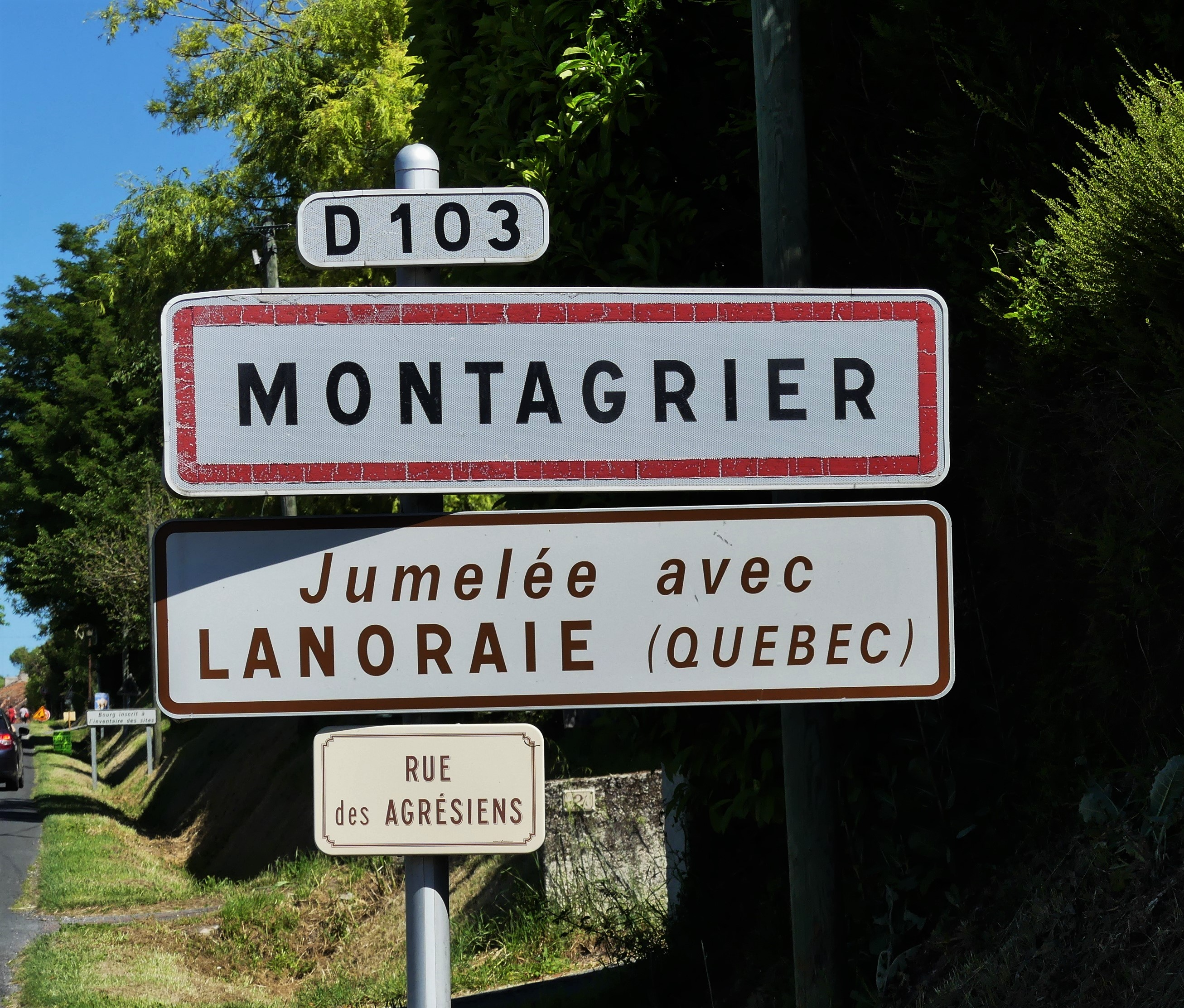 Panneau de jumelage à Montagrier, Dordogne, France.